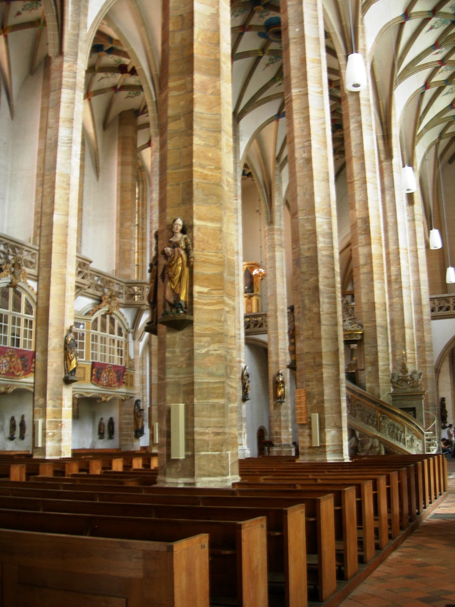 Freiberg, St. Marien, interior. 1485-1501